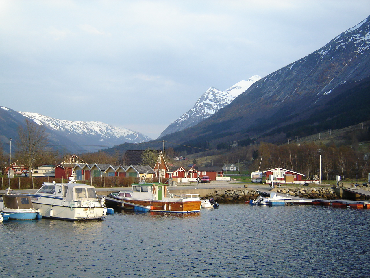 Uskedalen, Norway. Harbour (Uskedal batlag)